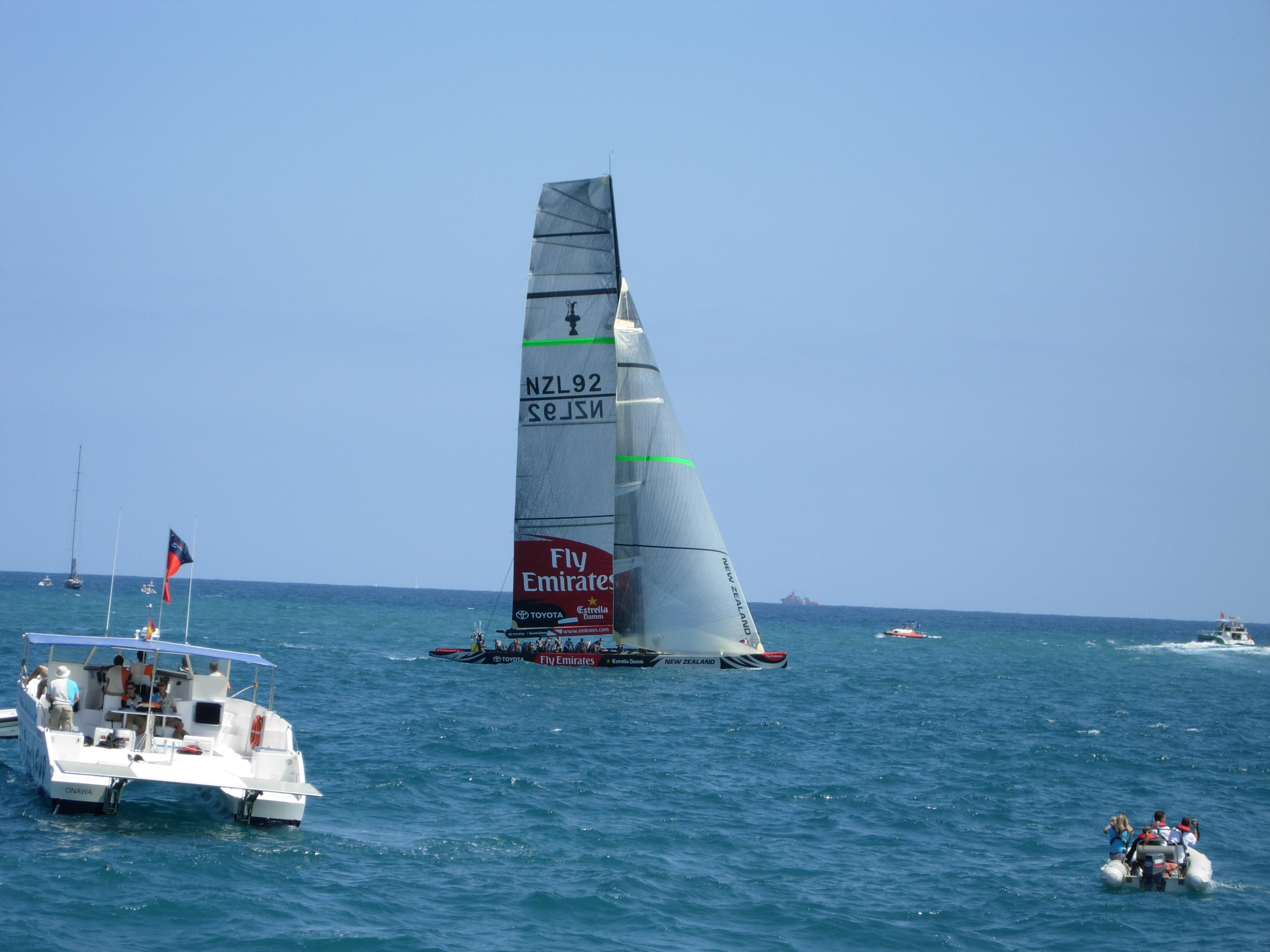 Emirates Team New Zealand a Valencia